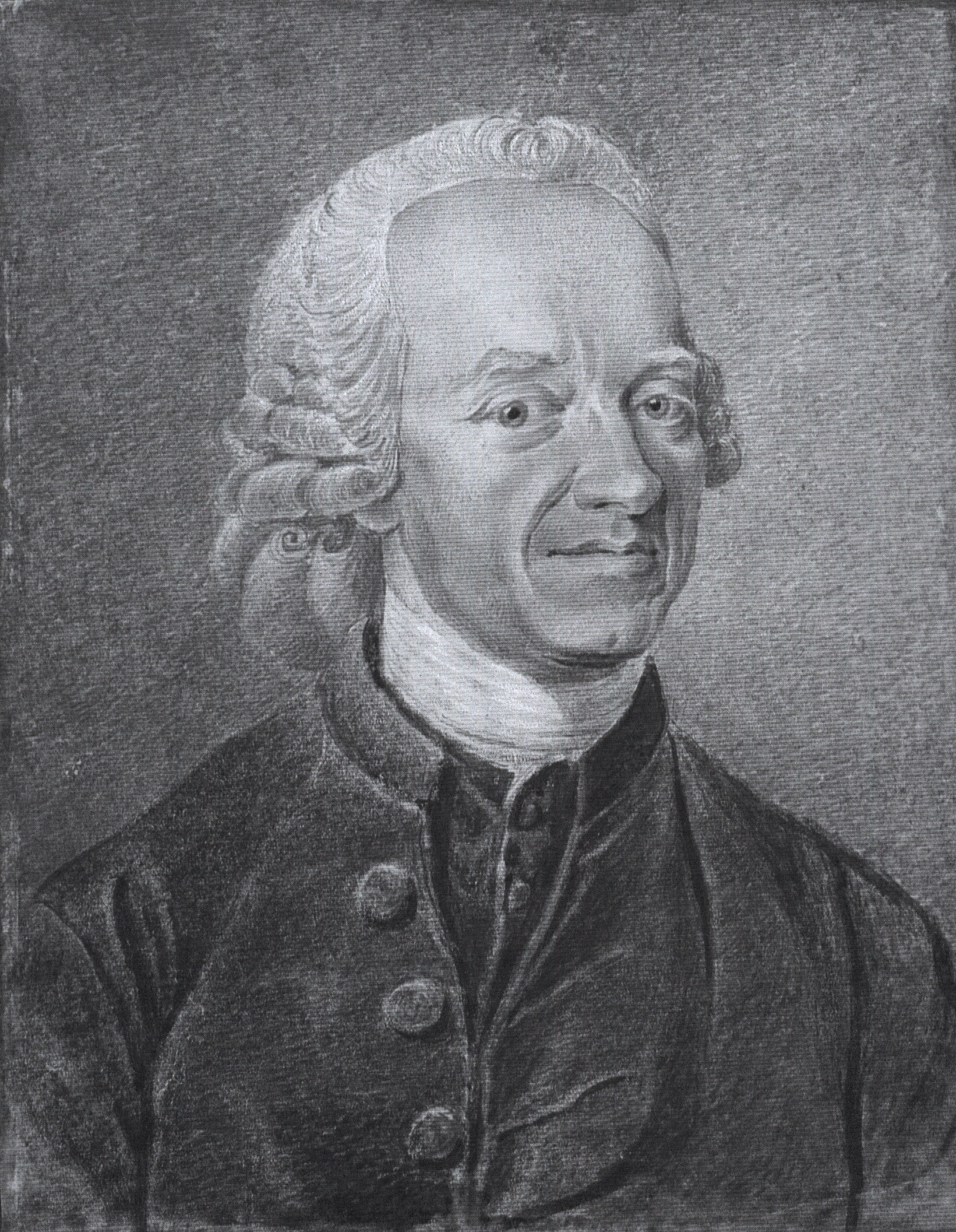 Johannes Frey (1743–1800), anonymes Porträt, 1793